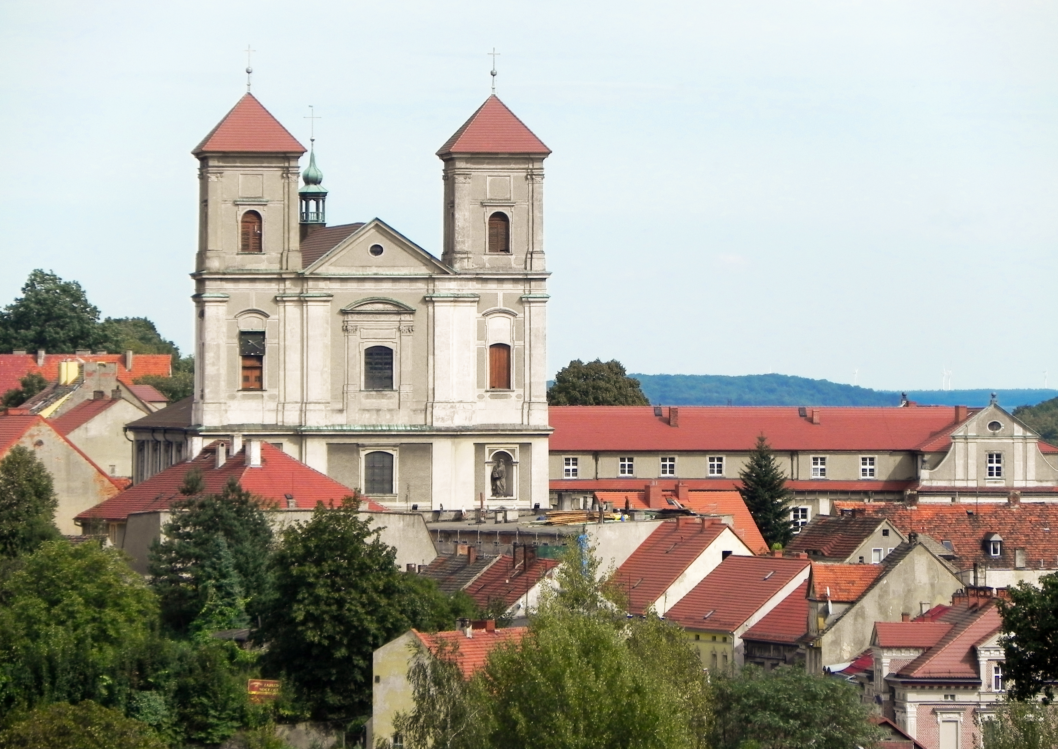 Bardo, kościół par. p.w. Nawiedzenia NMP, 1686-1704